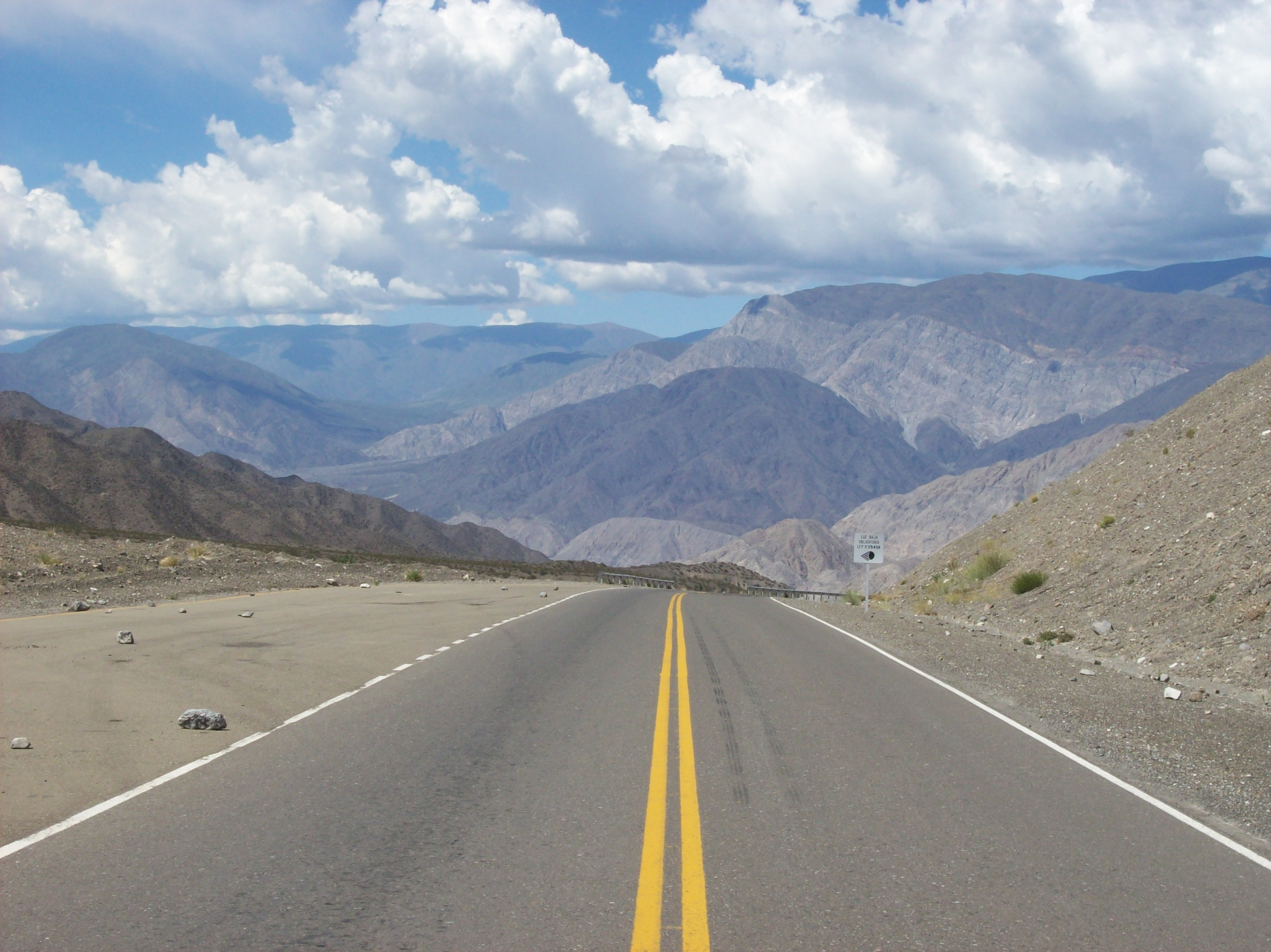 Ruta Nacional 149 en la Quebrada de las Burras, provincia de San Juan, Argentina. Es un descenso de 1000 metros en 14 km de recorrido.